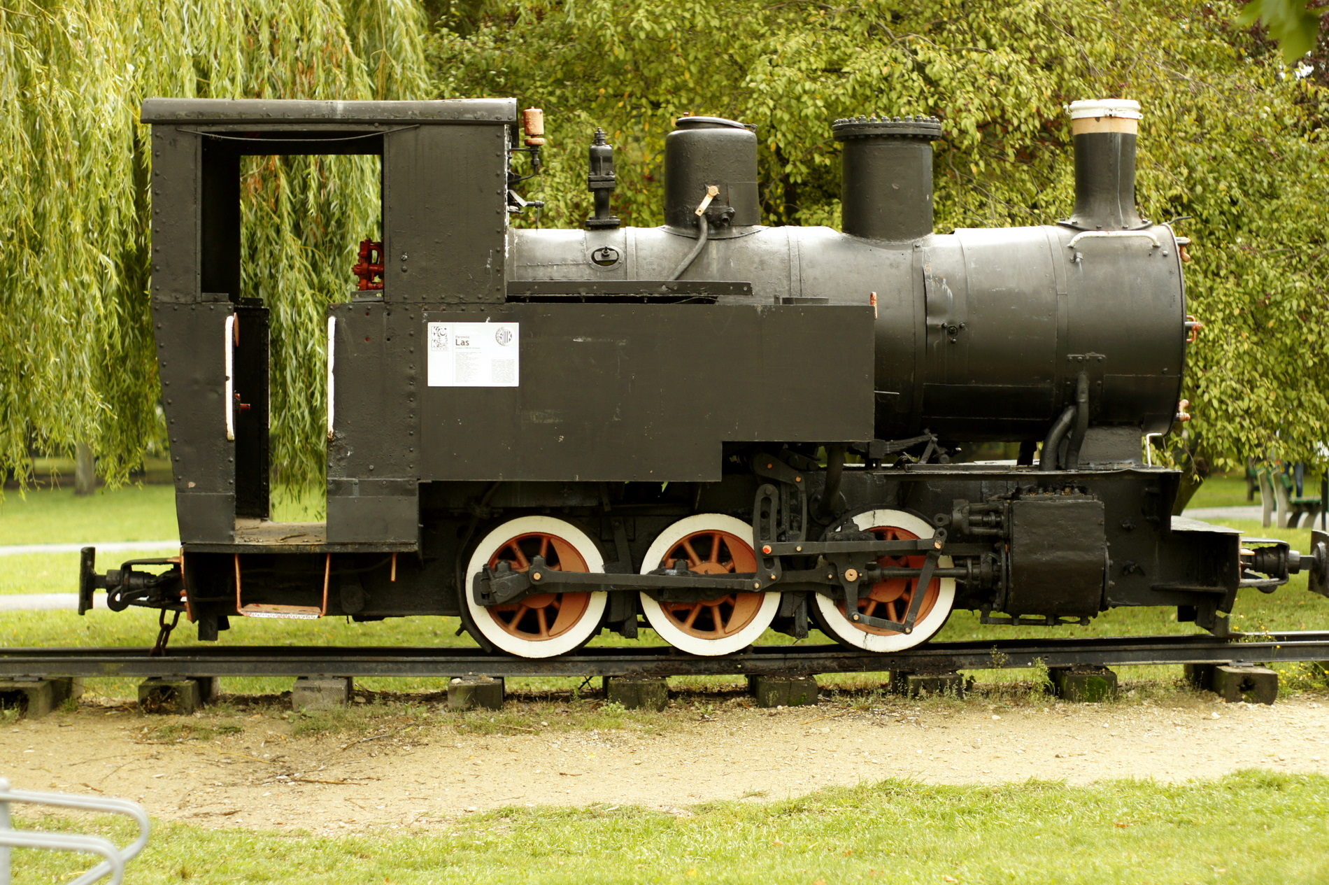 Parowóz Las47 produkowany w latach 1948-1962 w Fabryce Lokomotyw w Chrzanowie. Na fotografii egzemplarz nr 3515 z 1957 r., od 15. 10. 2009 r. eksponowany w parku miejskim w Ostrowie Wlkp. ( w latach 1984 - 2009 przed Technikum Kolejowym )